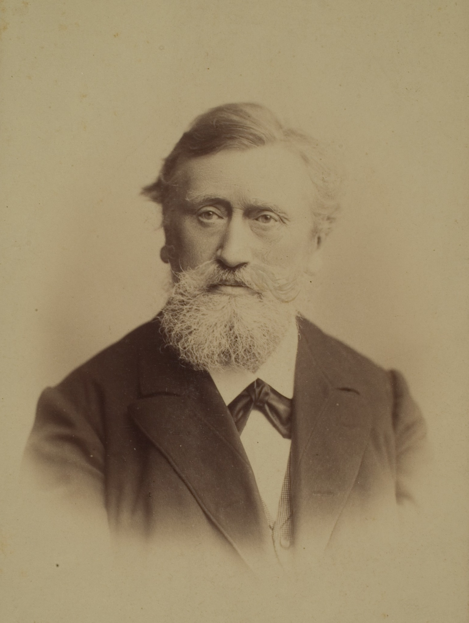 Karl Knies, Nationalökonom, 1865–1896 Professor in Heidelberg